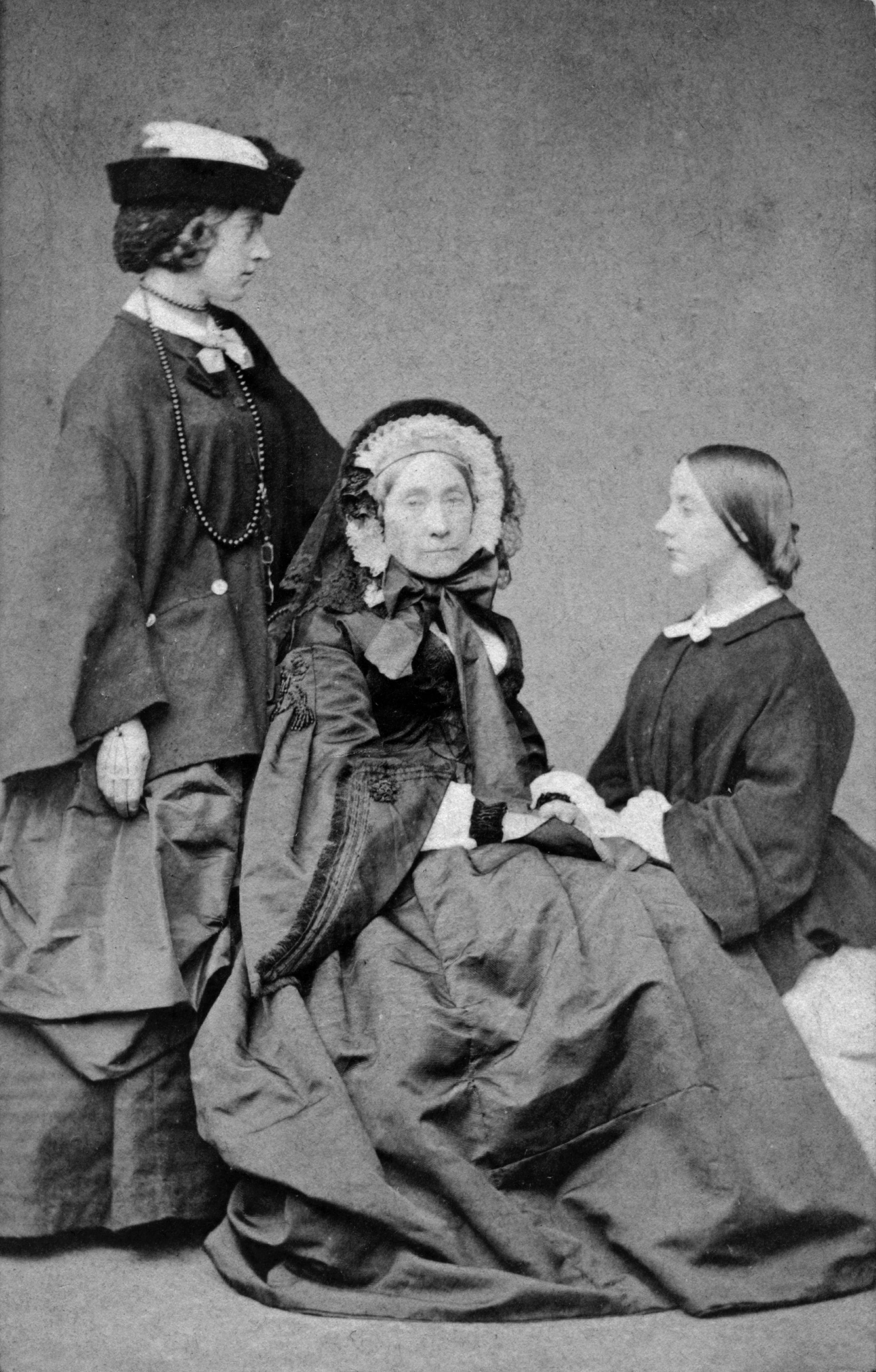 Alexine Tinne, Henriëtte Tinne-van Capellen en Jetty Hora Siccama te Parijs. Op deze foto dragen alleen Henriëtte en Alexine reiskleding. ca. 1860 Collectie Rijksbureau voor Kunsthistorische Documentatie